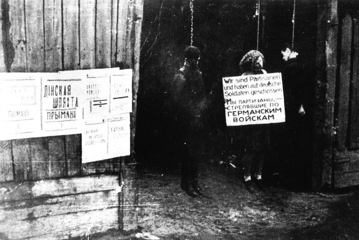 Résistante russe juive, pendue par les allemands le 26 octobre 1941. Photographie prise par un photographe lithuanien collaborateur des Nazis. Non identifié à ce jour.